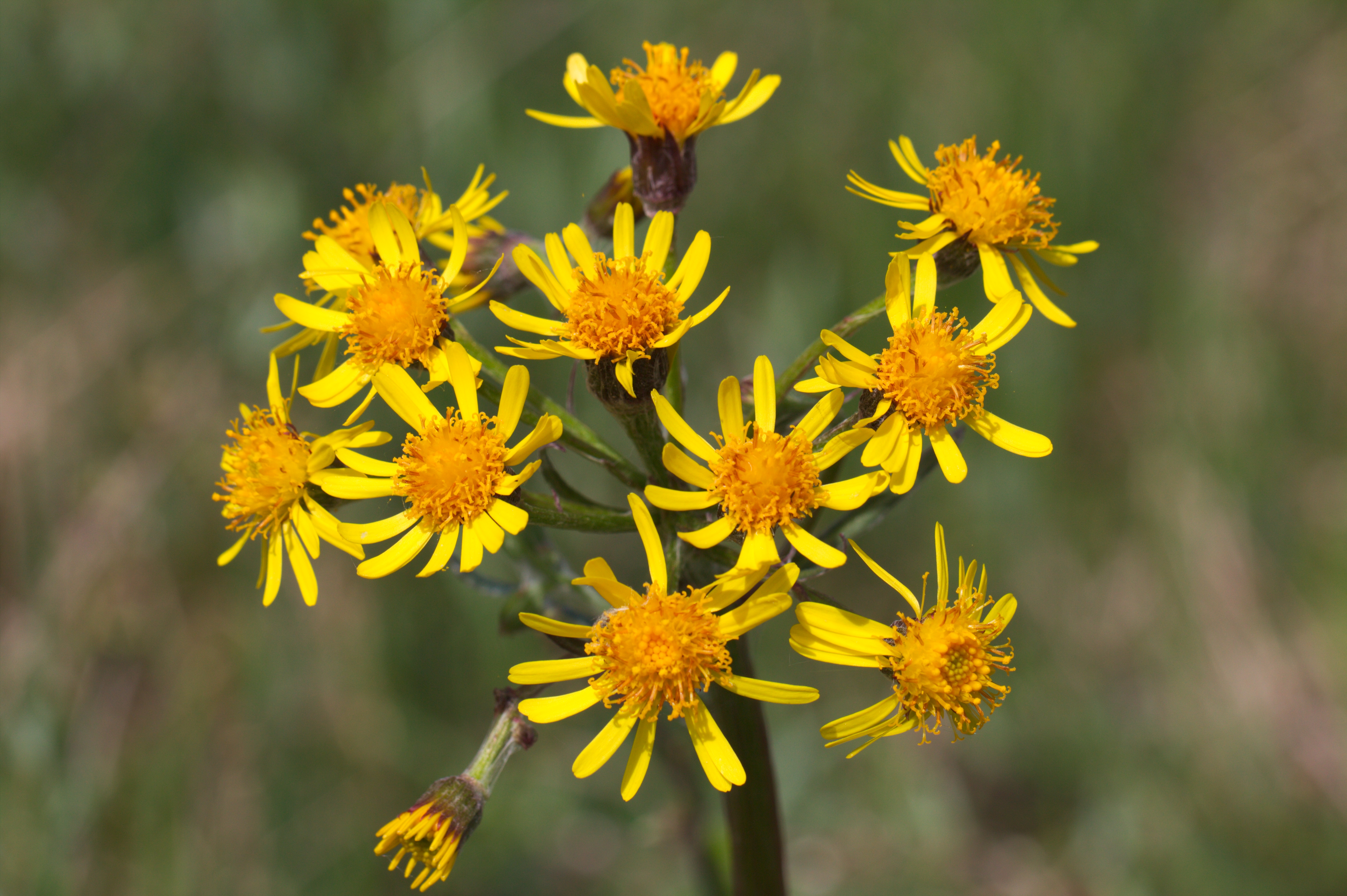 Brouskův mlýn - (národní přírodní rezervace) - Tephroseris crispa (Jacq.) Schur, starček potoční - C4a (vzácnější taxony vyžadující pozornost)